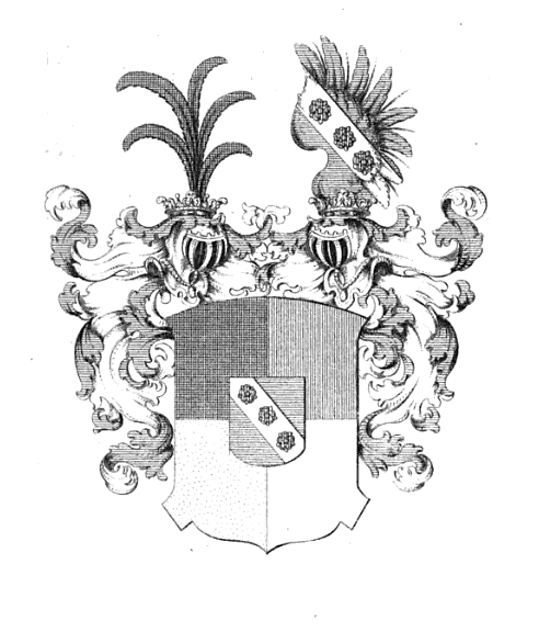 Grb baronske veje rodbine Dyhrn, 18. stoletje. Slika je kopija originala, ustvarjena z optičnim čitalnikom. Zasebni arhiv.